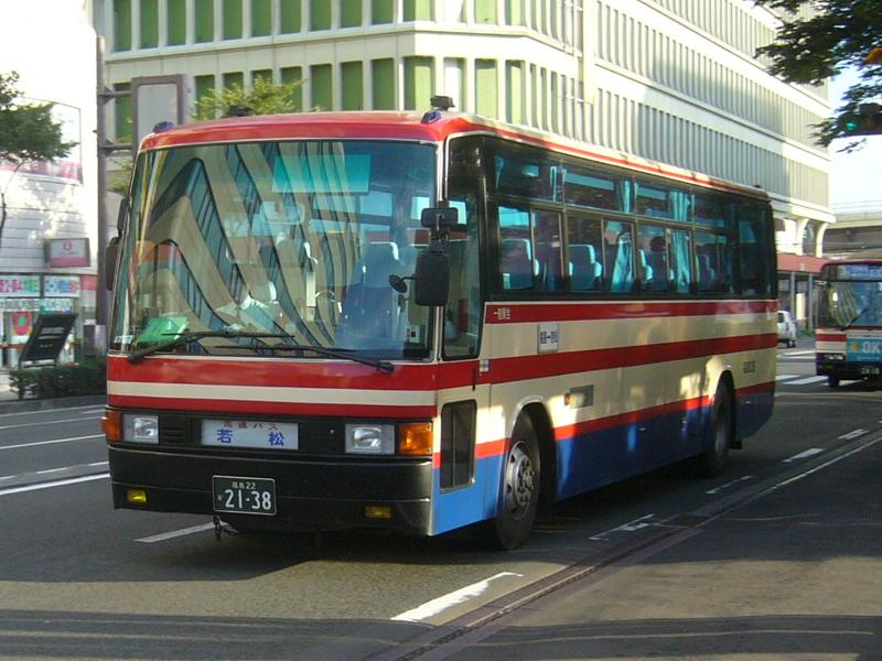 登録番号 福島22か21-38 福島交通所属 都市間高速バス用 （各系統で共通運用） 2007年10月14日 福島駅前にて撮影 撮影者 Tokatsu kokubu